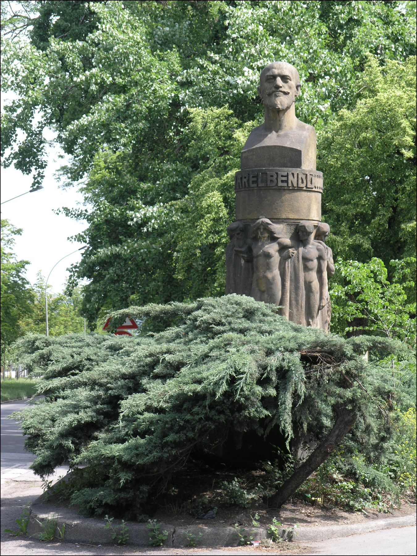 Praha, Bubeneč - Karel Bendl - pomník na rohu Pelléovy a Pod kaštany (autor Stanislav Sucharda)